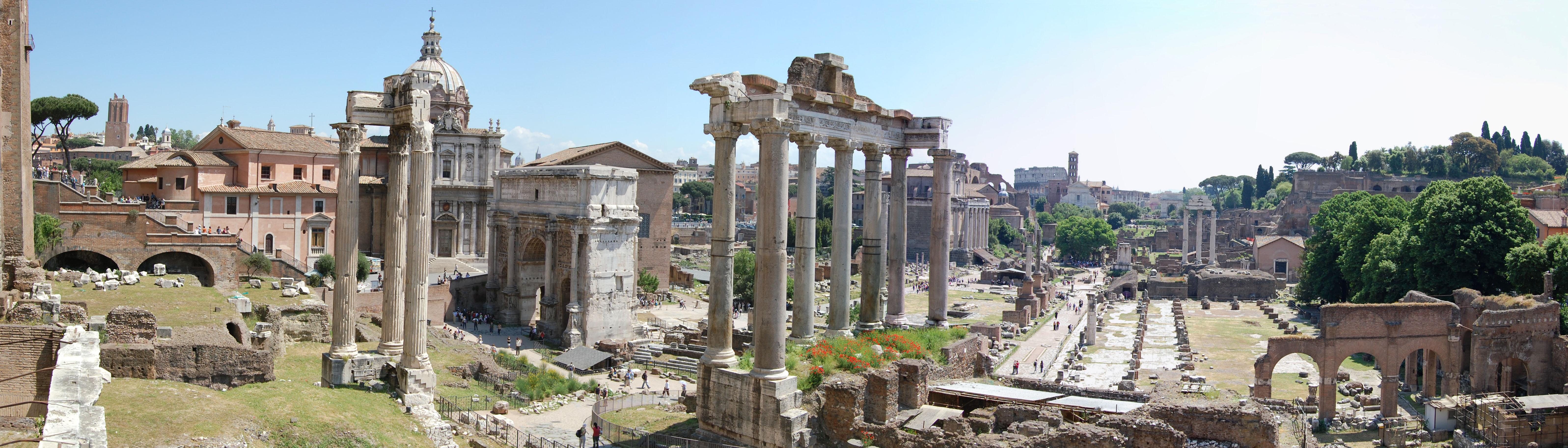 Veduta dei fori imperiali dal Campidoglio